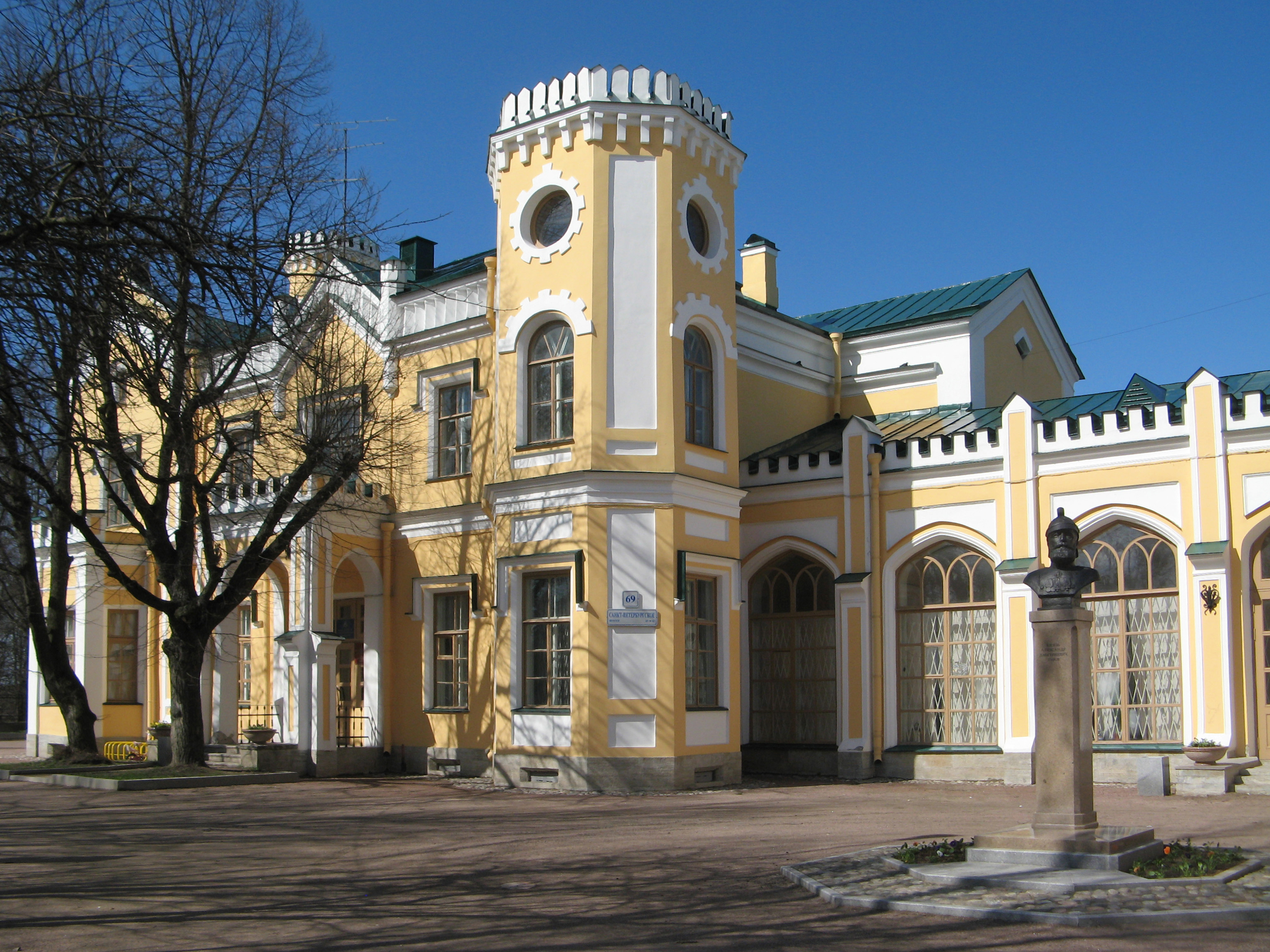 Дача Александрова П.К. (Львовский дворец): Санкт-Петербургское шоссе, 69, Нижняя дорога, Стрельна, Петродворцовый район, Санкт-Петербург